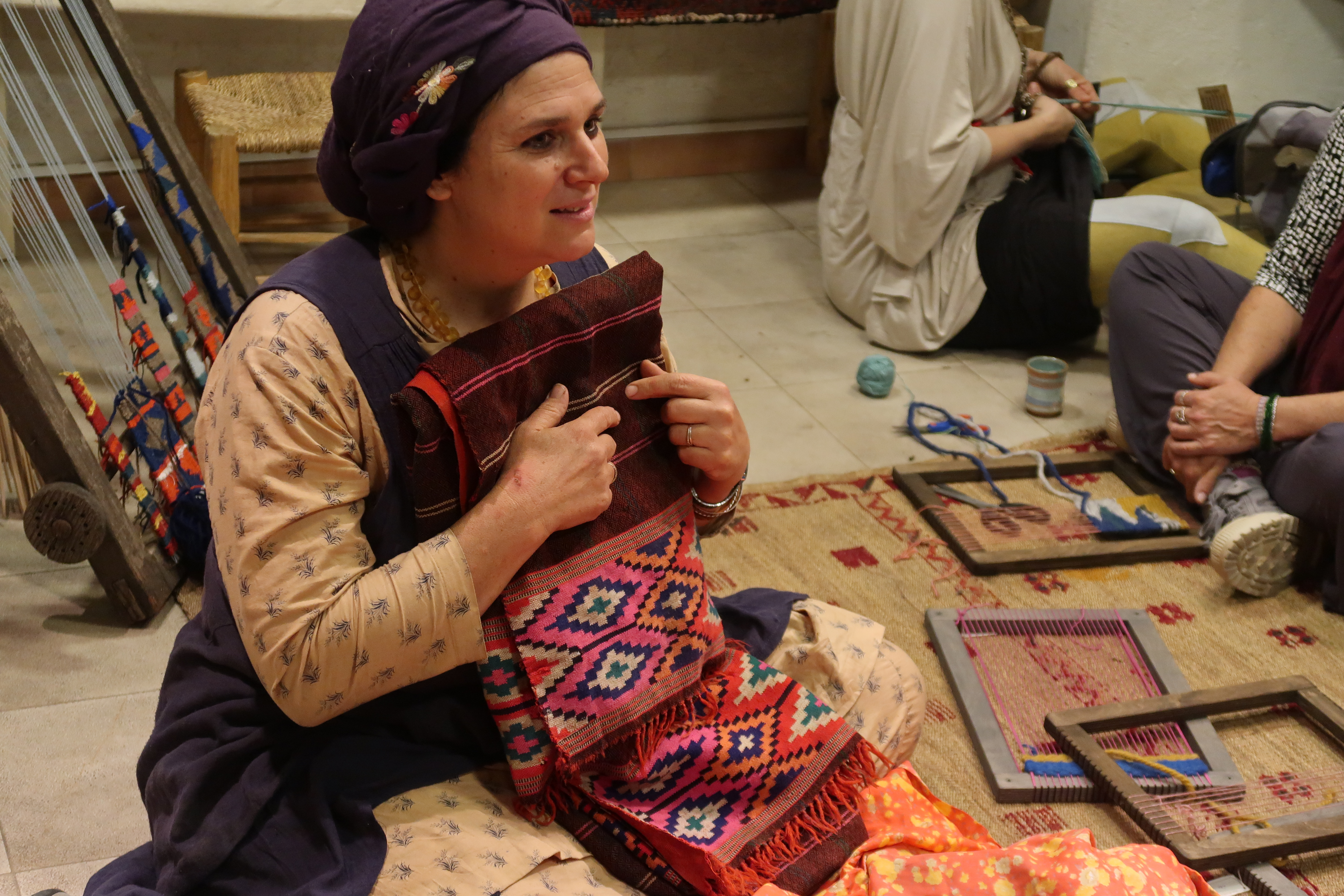 טליה בהשקת הספר הודו מחזירה מתנות